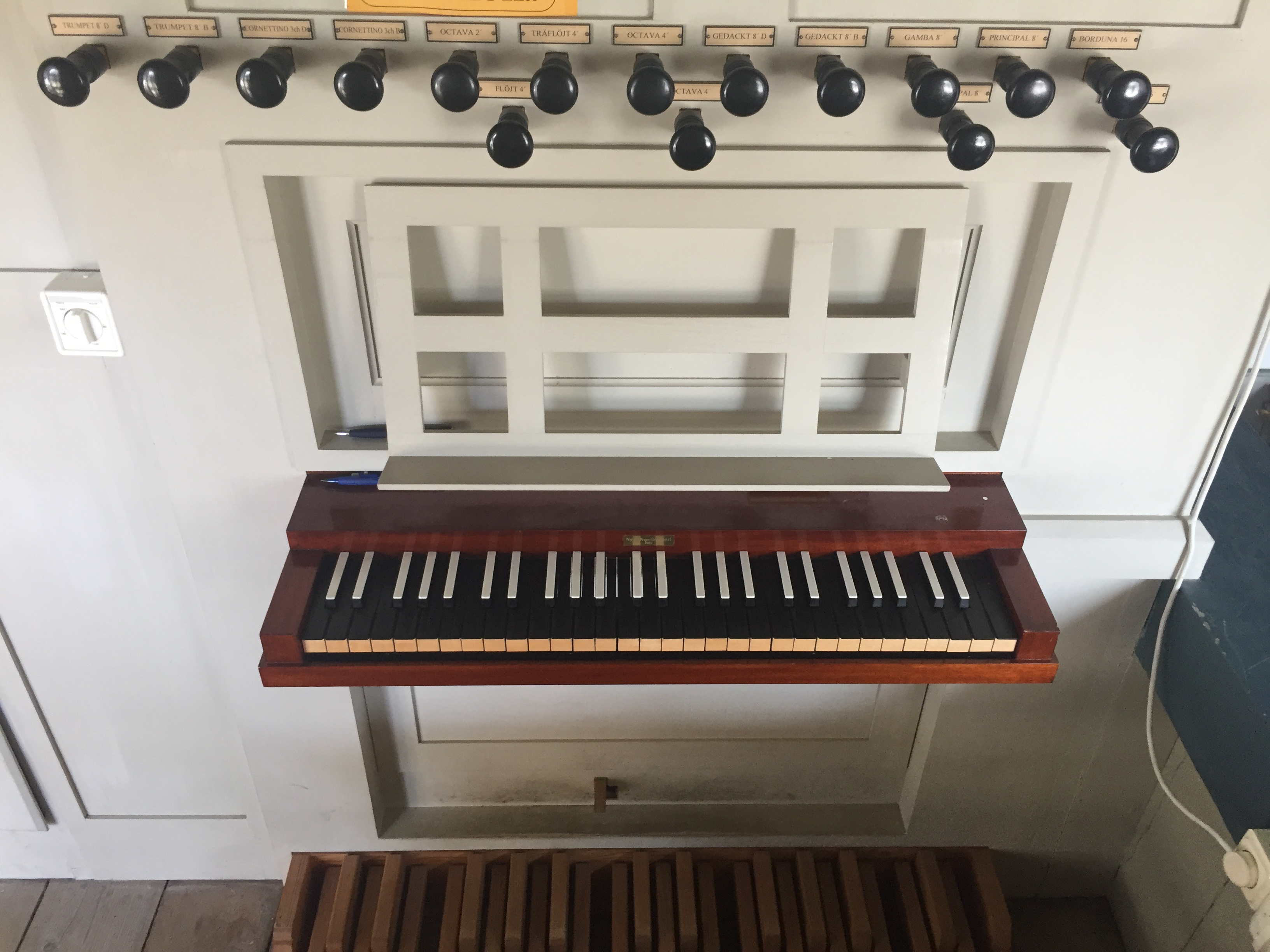 Vickleby kyrka, Öland. Orgelns spelbord.